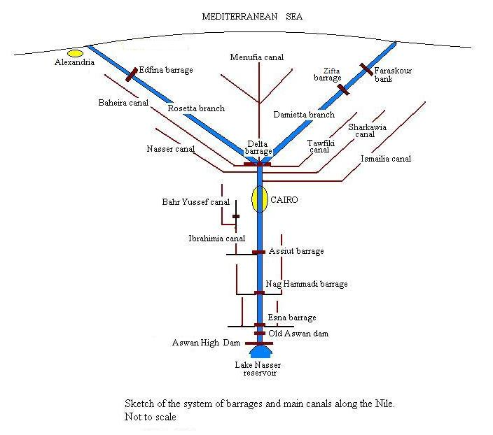 Hoodkanalen voor irrigatie in Egypte